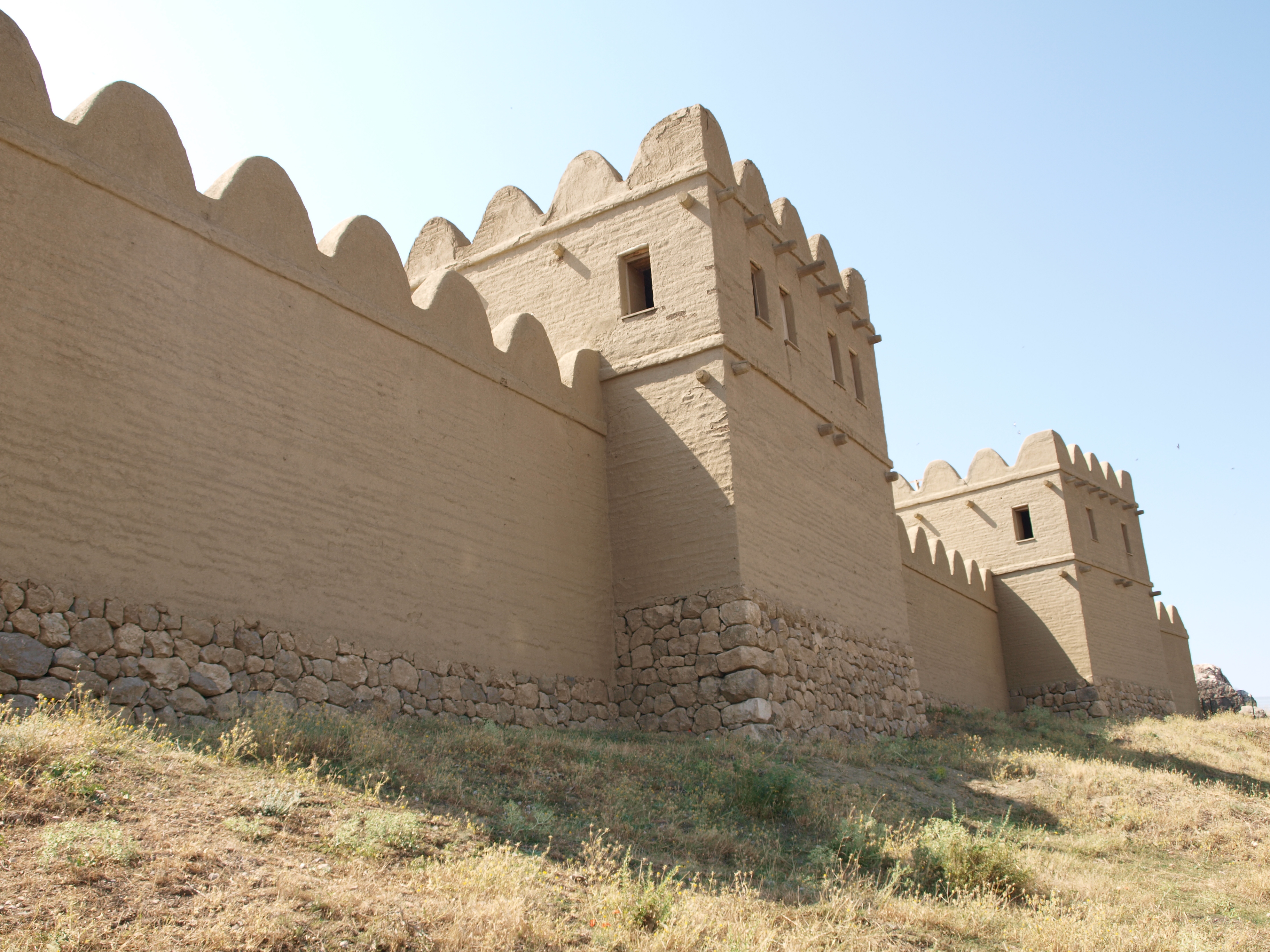 Rekonstruierter Stadtmauerabschnitt in Hattusa